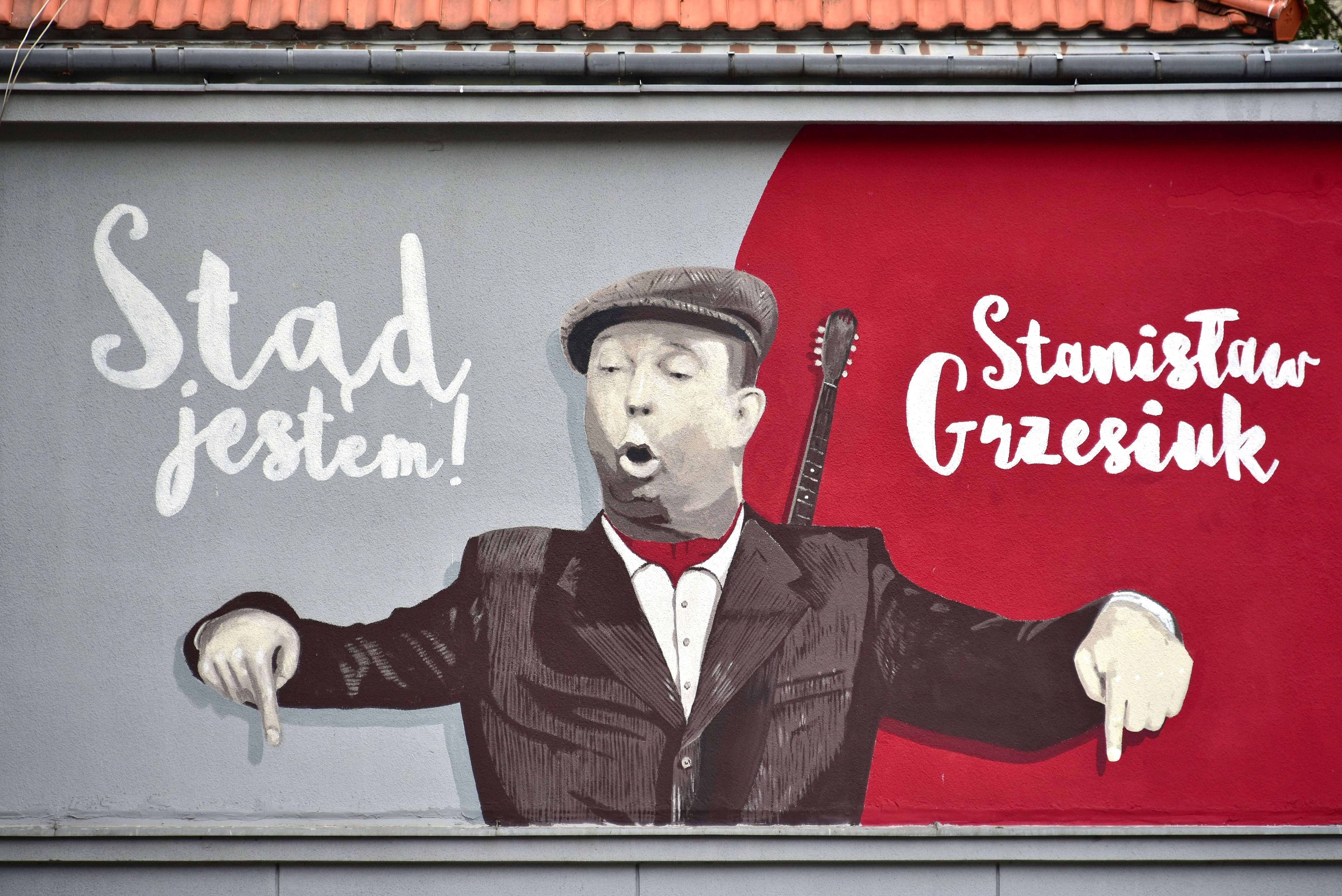 Mural upamiętniający Stanisława Grzesiuka na bocznej ścianie budynku orzy ul. Lubkowskiej 7/9 (od strony ul. Gagarina) w Warszawie